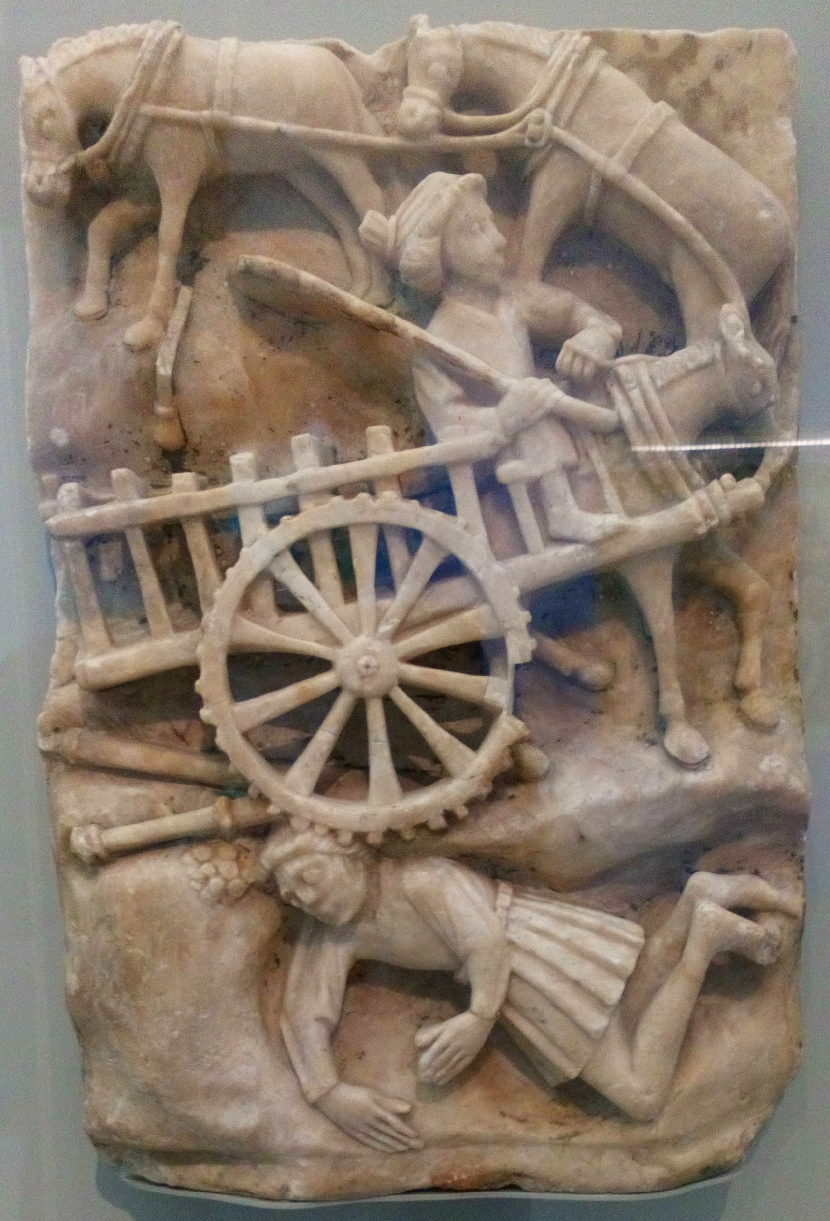 Sculpture en albâtre (atelier de Nottingham ? XVe siècle) , Légende de saint Nicolas : Le Châtiment du débiteur, provenant de l'église de Conty (Somme), Musée de Picardie.